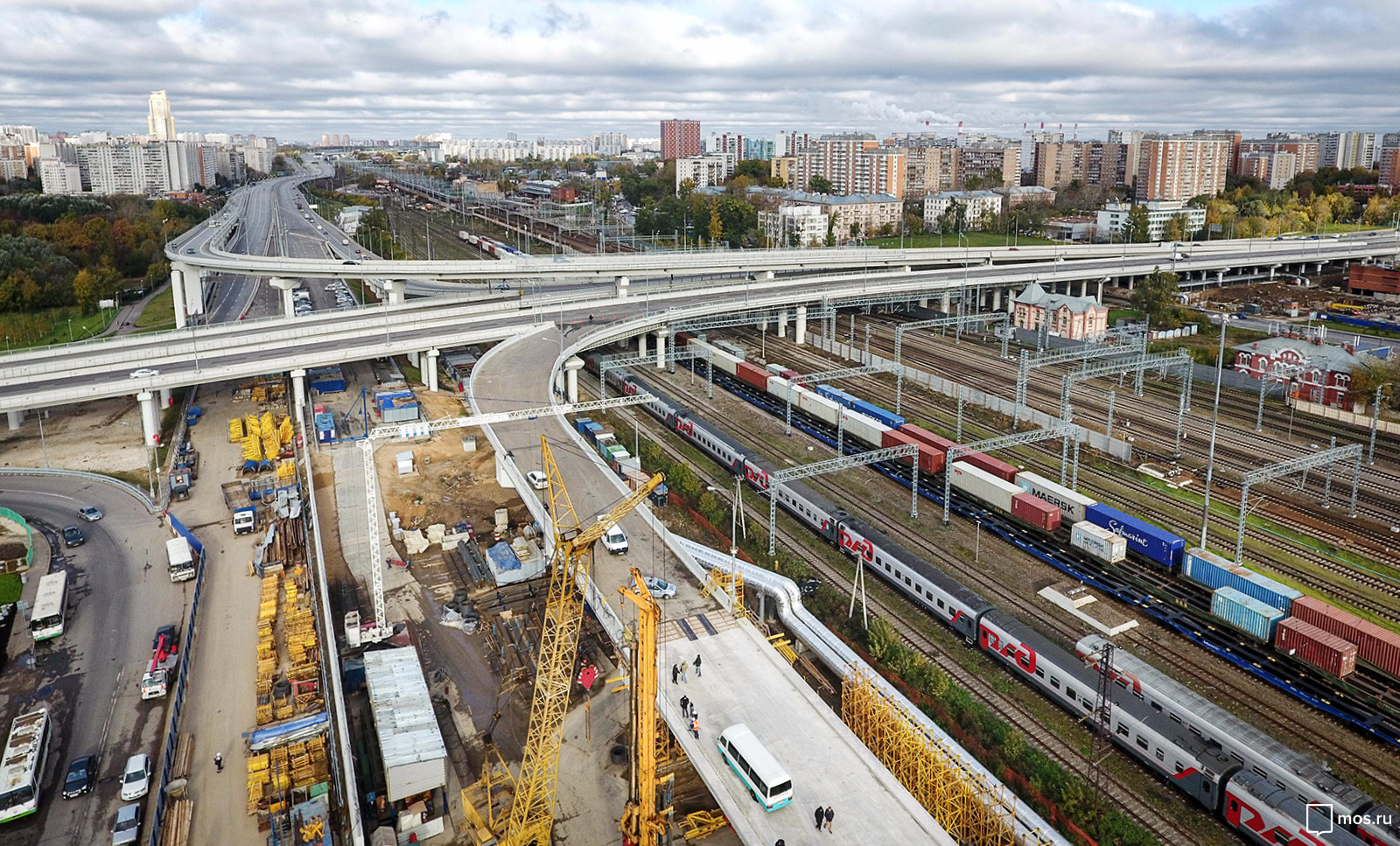 Строительство участка Северо-Восточной хорды в районе Фестивальной и Талдомской улиц (Ховринский путепровод) (октябрь 2016).